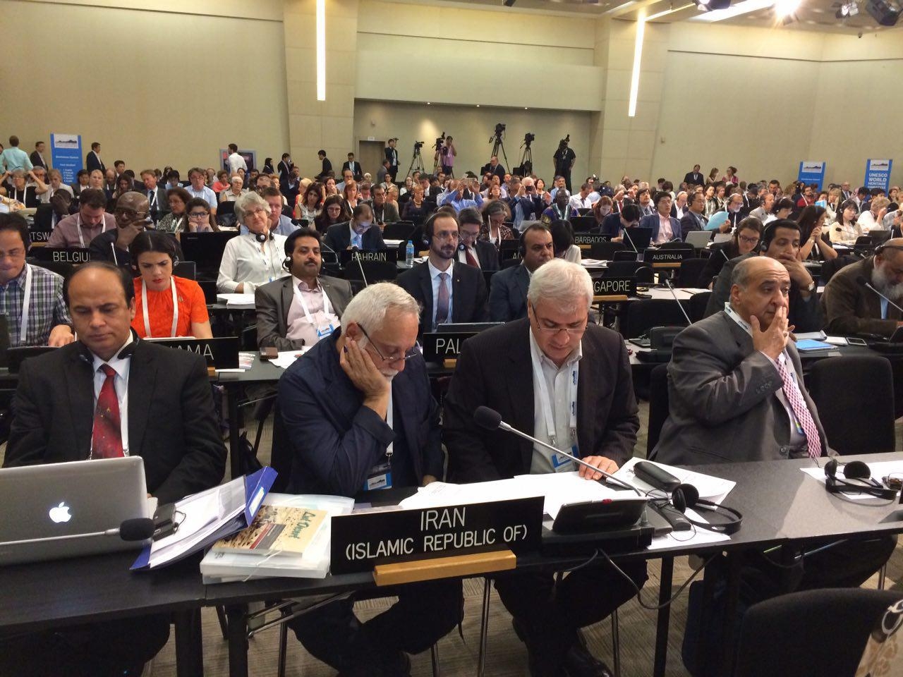 دکتر رسول وطن‌دوست